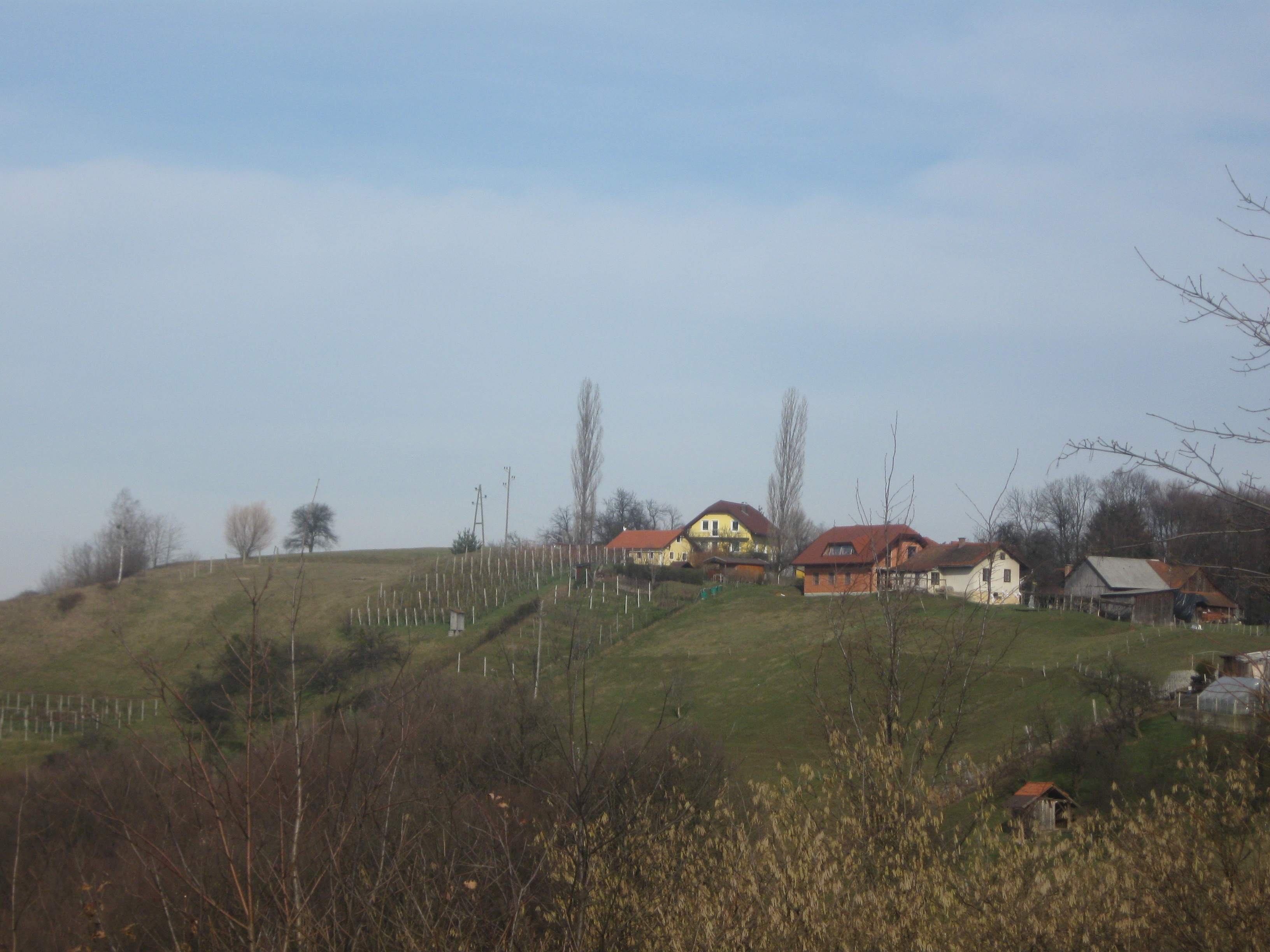 posnetek del naselja Čagona.